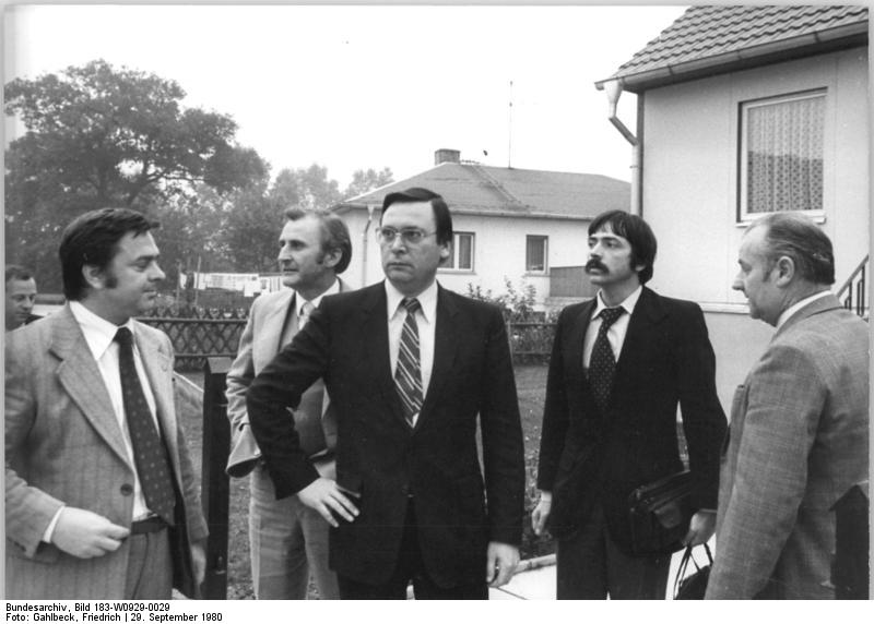 LPG Loebnitz, Besuch einer französischen Delegation ADN-ZB Gahlbeck eb-29.9.90 Bez. Leipzig: Die Delegation der französischen Nationalversammlung unter Leitung des Vizepräsidenten Andre Delehedde (3.v.l.) besuchte die LPG Pflanzenproduktion Loebnitz im Kreis Delitzsch. Hier die Abgeordneten in der Eigenheimsiedlung der Genossenschaft. In Loebnitz entstanden seit 1972 einhundert Eigenheime.